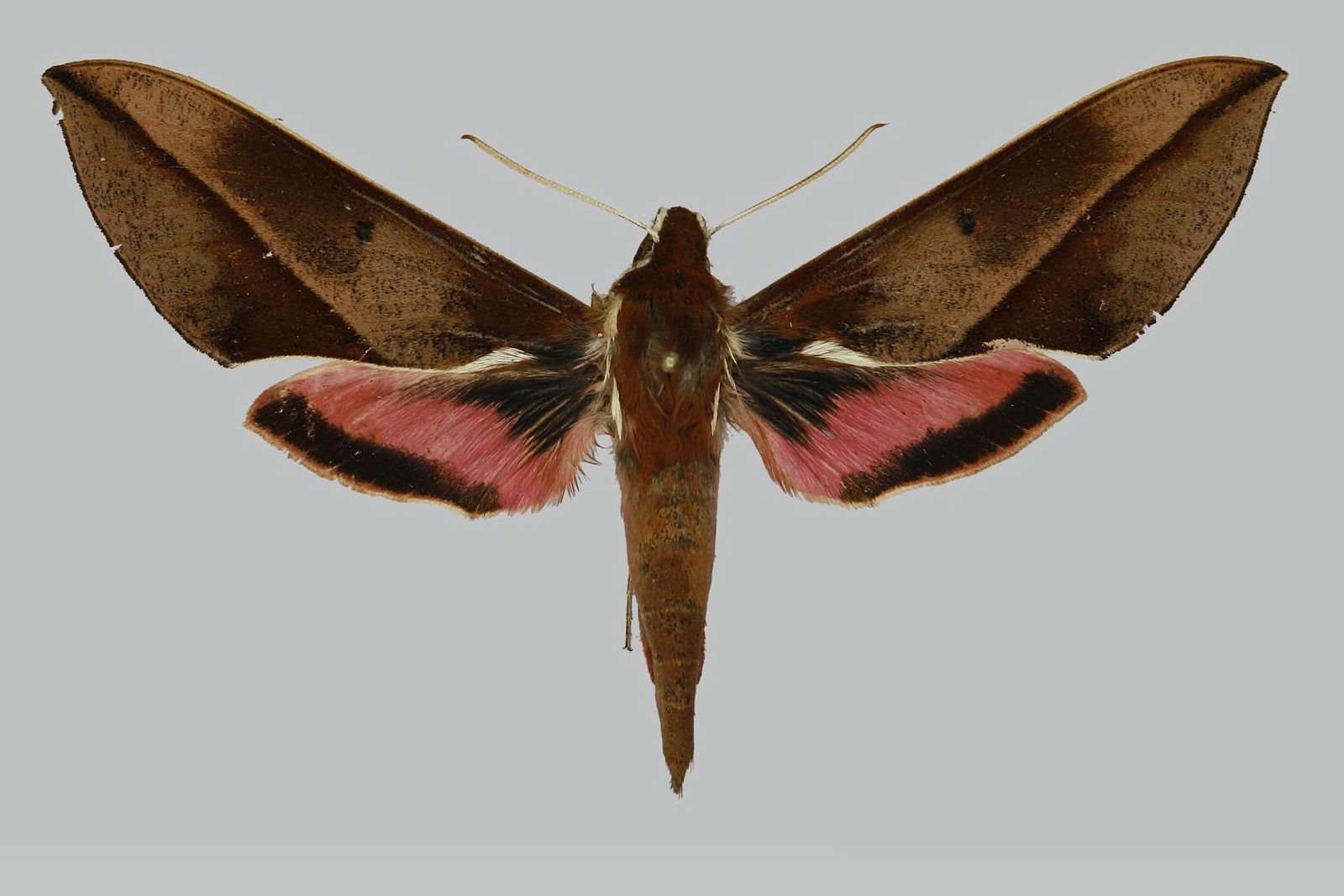 Chaerocina dohertyi meridionalis, female, upperside. Tanzania, Idolo mountains, Njombe Iringa region